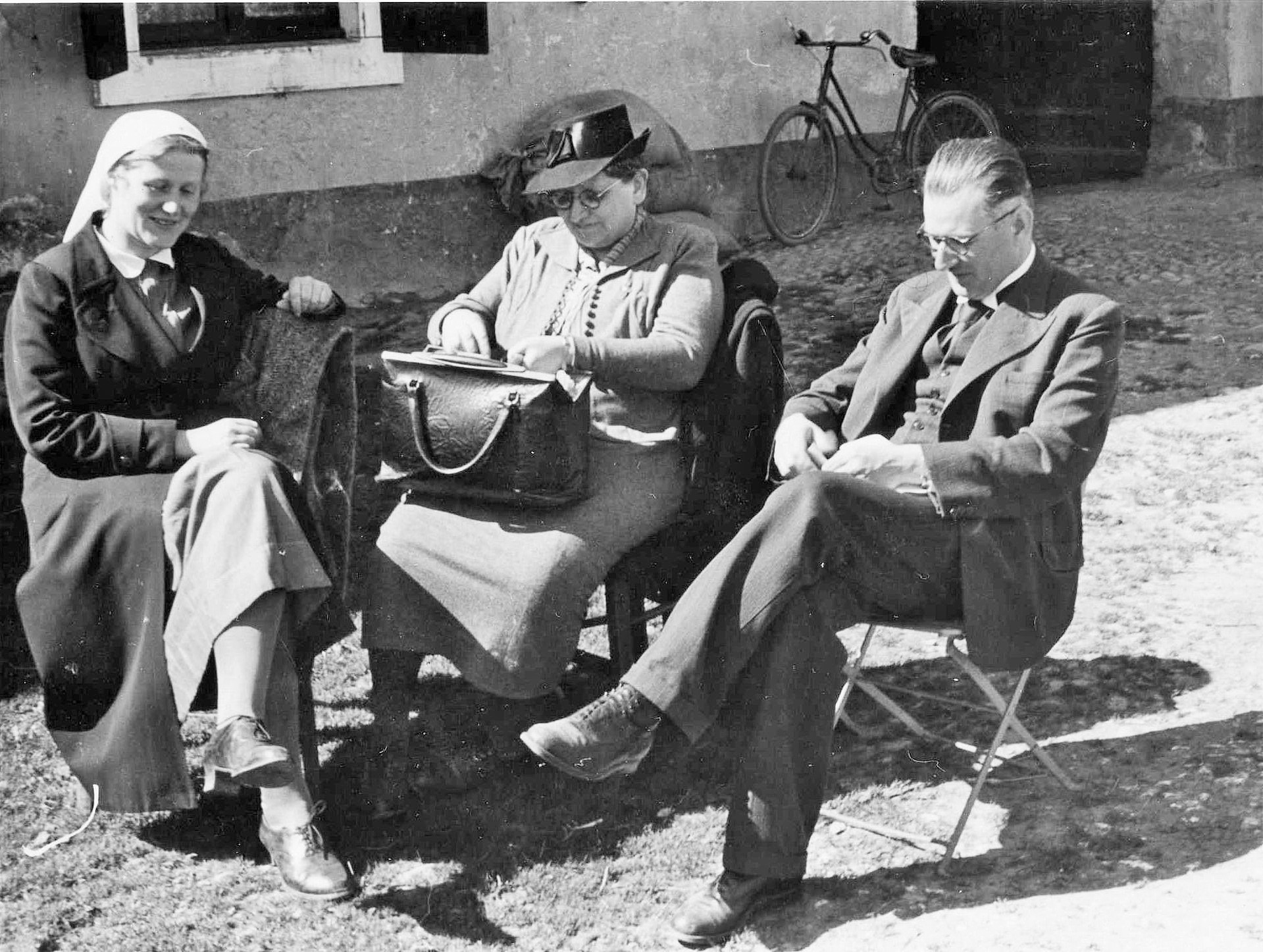 SRK Mitarbeiter im Lager Gurs, Frankreich, 1942